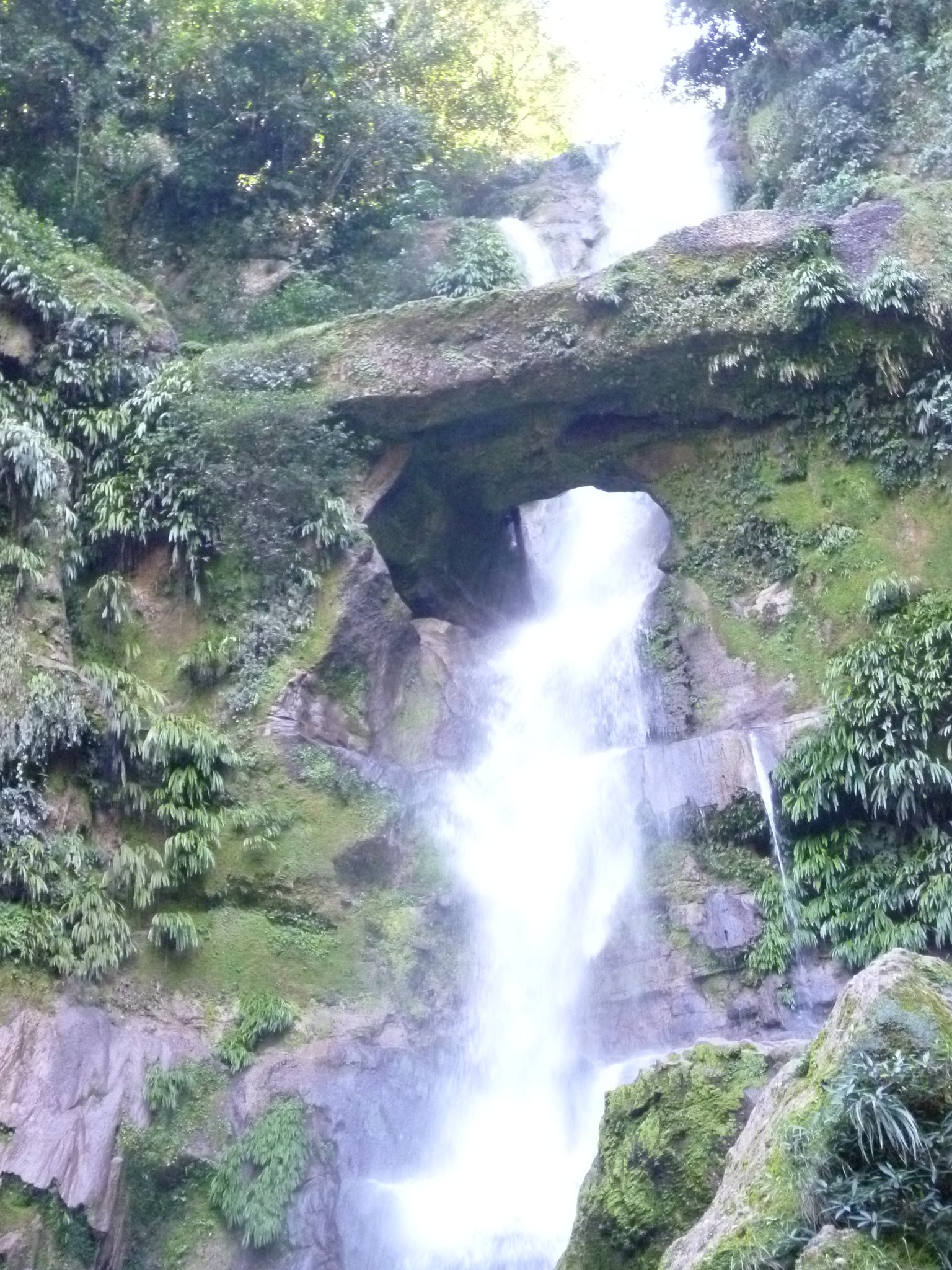 catarata del breo